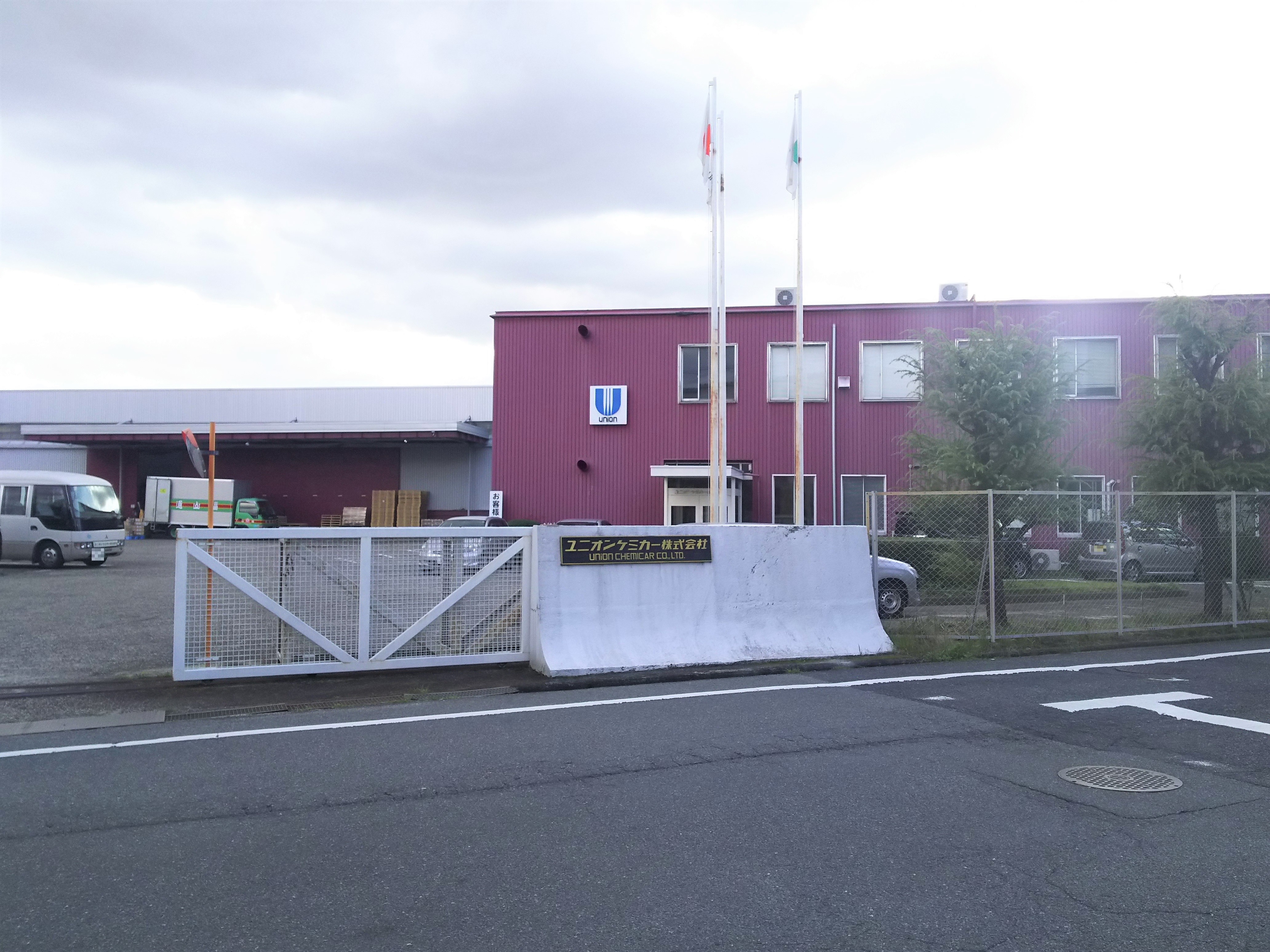 ユニオンケミカー本社（大阪府枚方市）